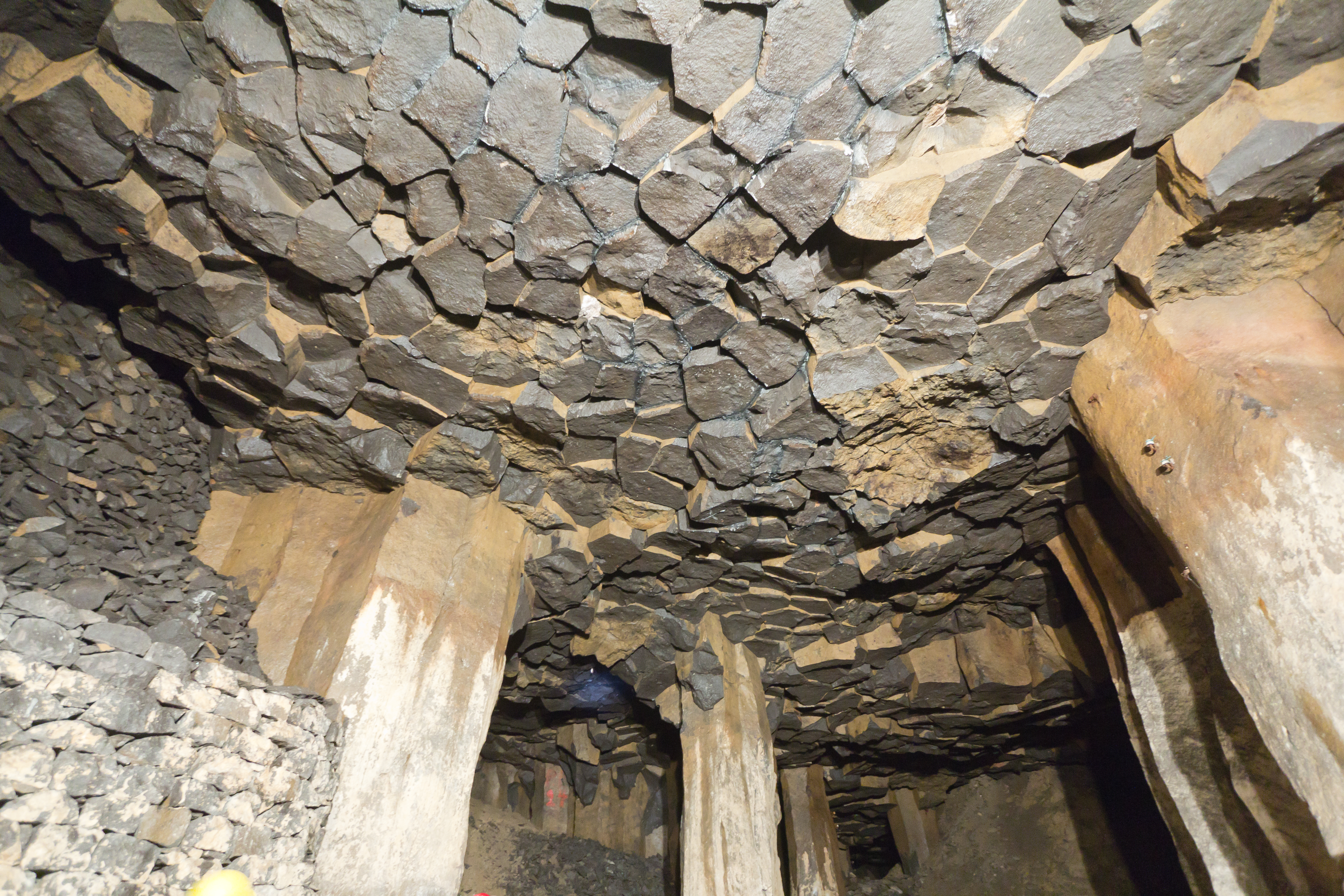 Decke und Säulen im Lavakeller Mendig